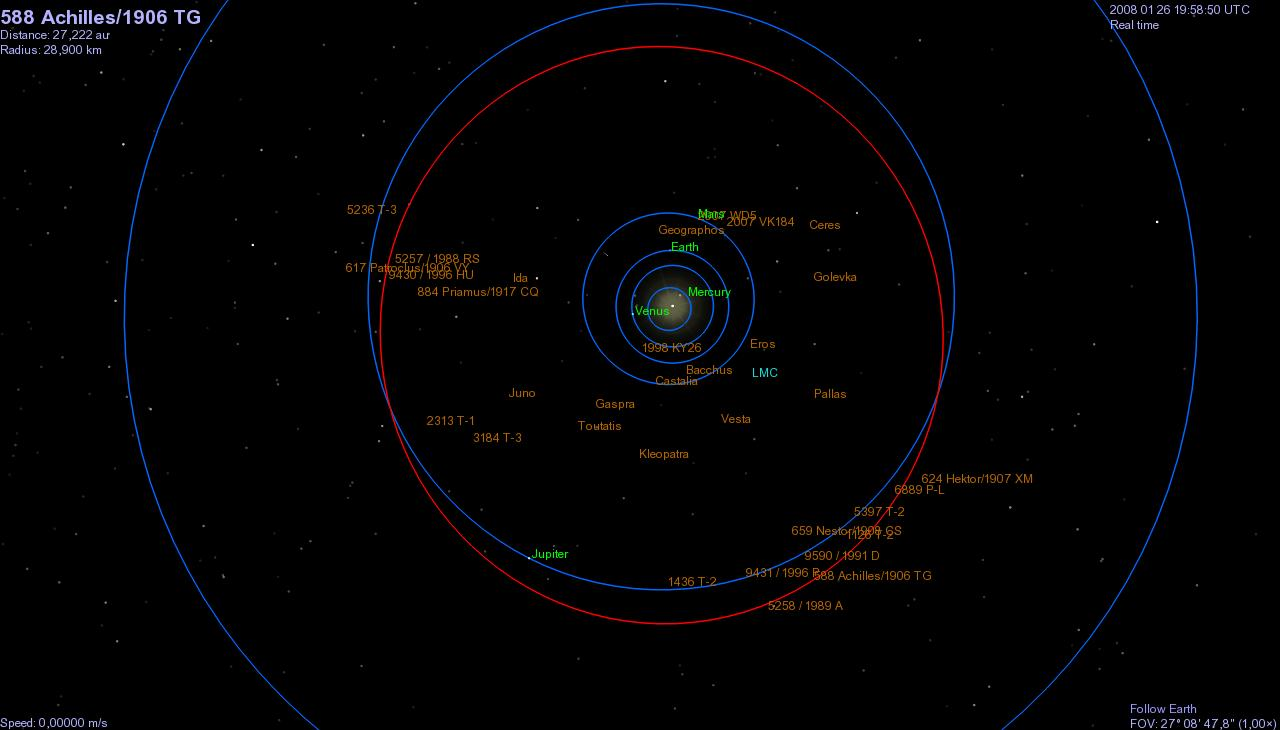 Orbita del asteroide Aquiles